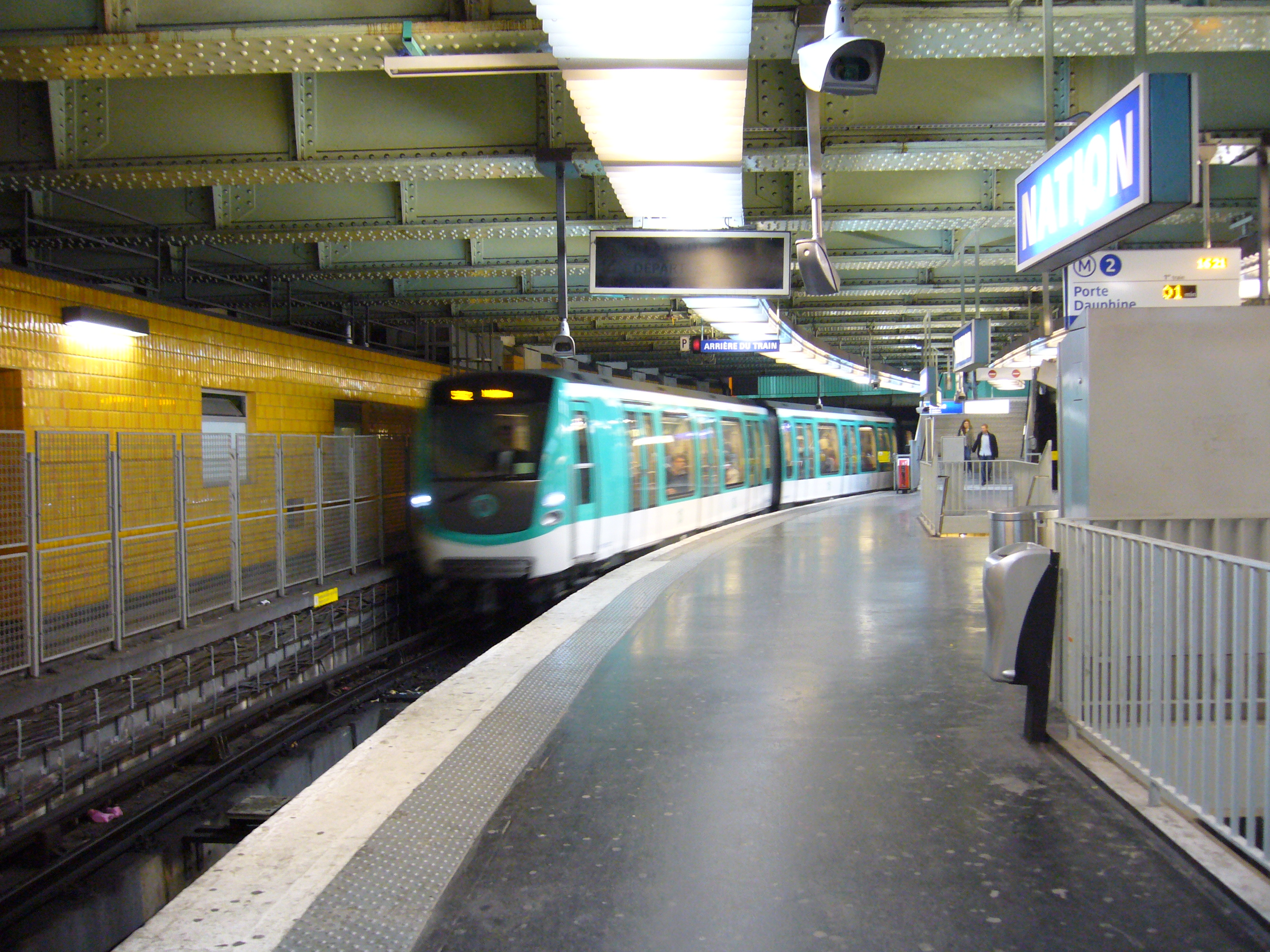 Un MF 2000 entre à la station Nation sur la ligne 2 du métro de Paris.